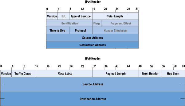 traza ipv4 e ipv6